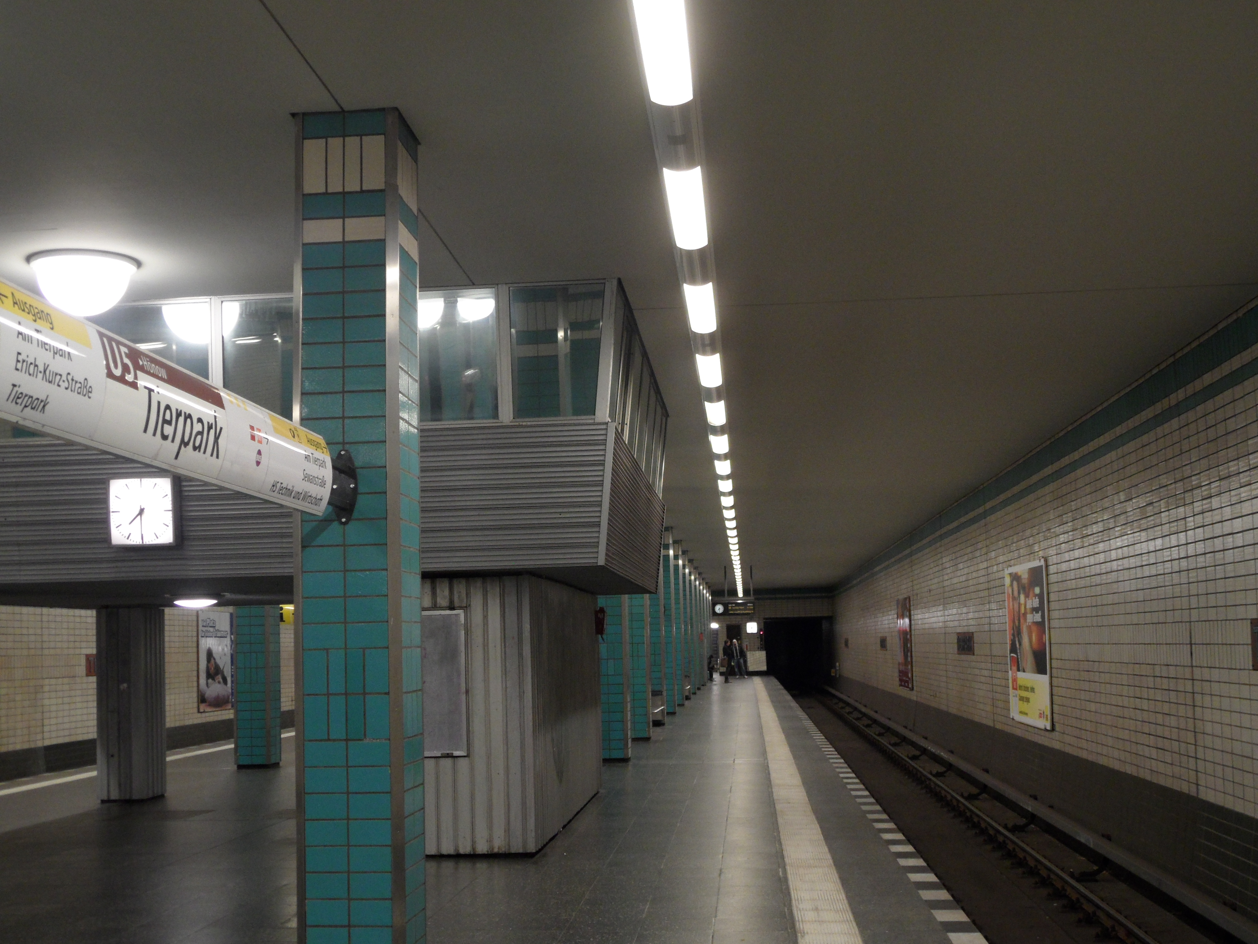 Berlin - U-Bahnhof Tierpark - Linie U5